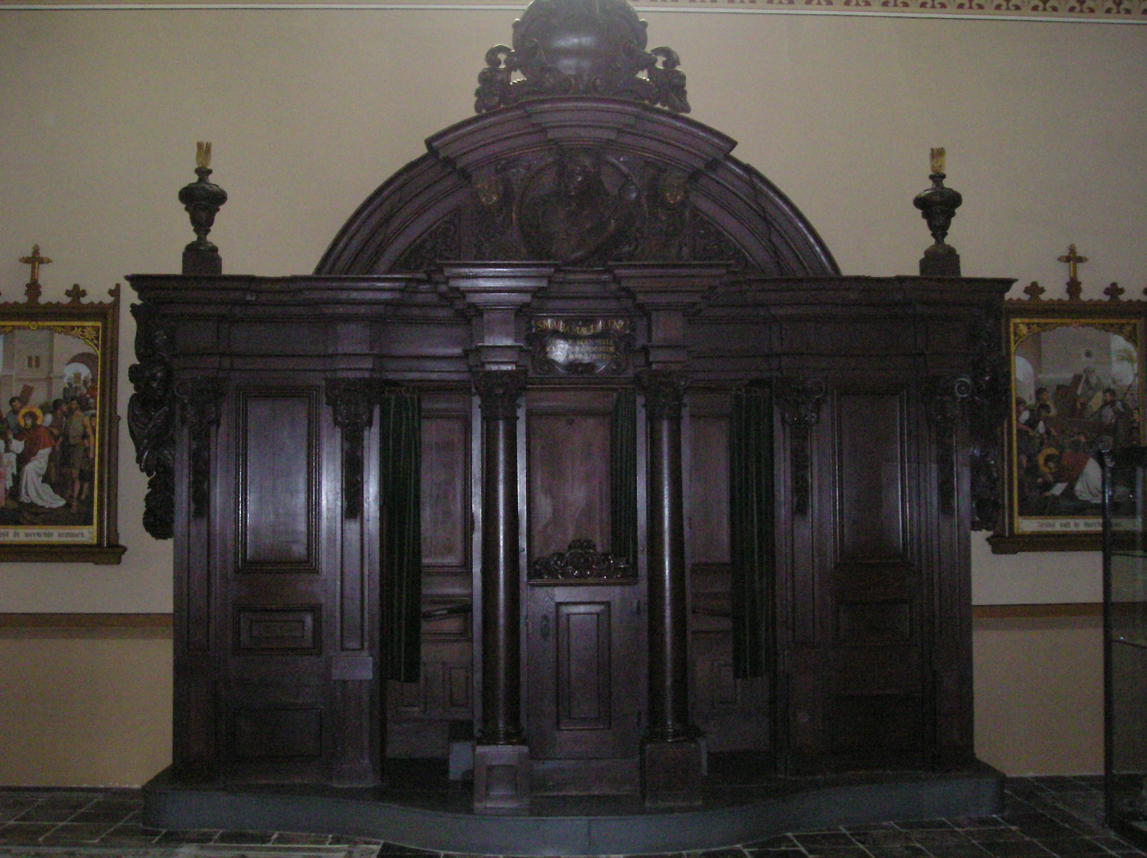 Sint Elisabethskerk Grave - Biechtstoel